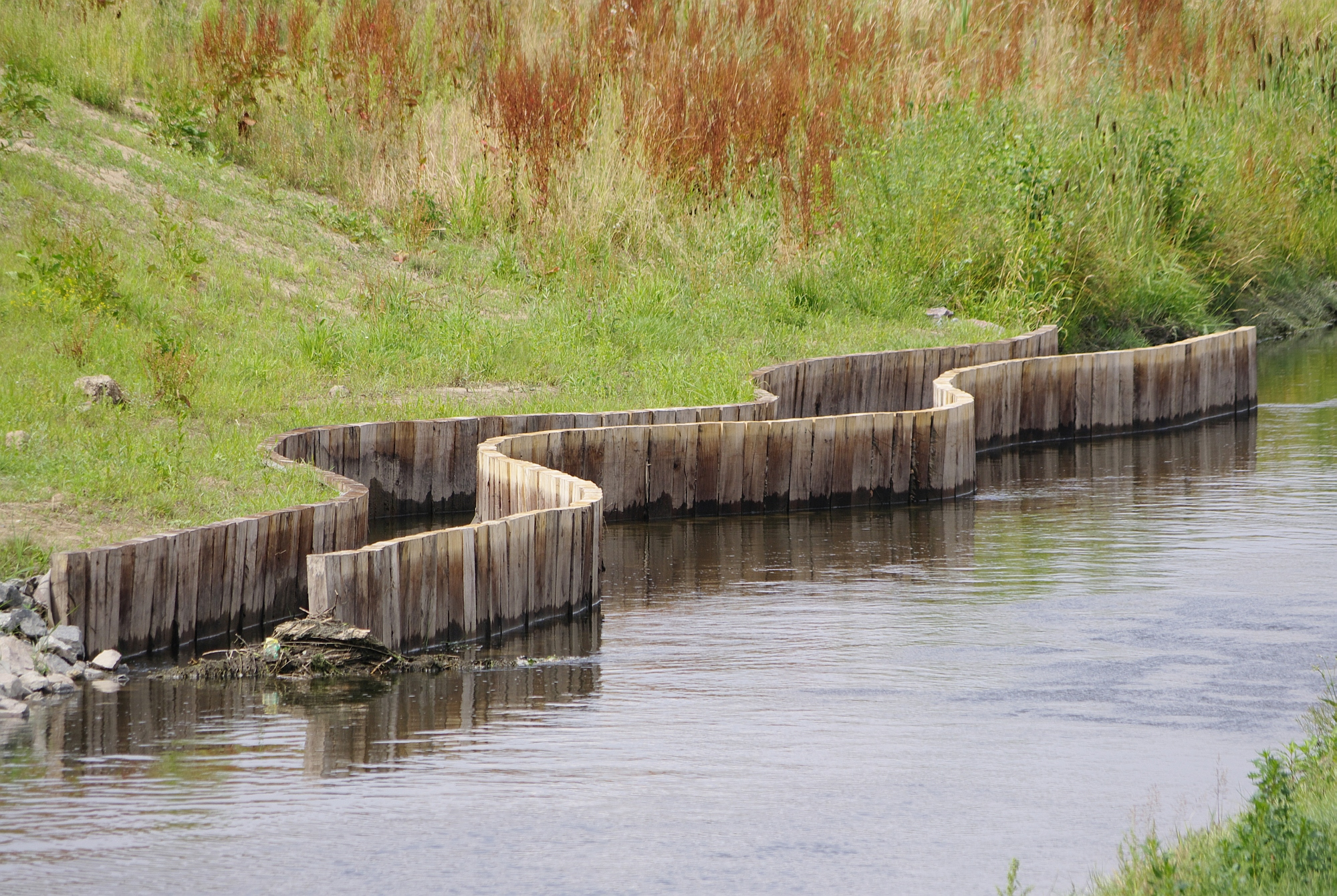 "Über Wasser gehen", ein Landschafts- und Kulturprojekt im Rahmen von RUHR.2010, "Line of Beauty - das fünfte Klärwerk", Susanne Lorenz, 2010, in Kooperation mit dem Biologen Dr. Stephan Pflugmacher.